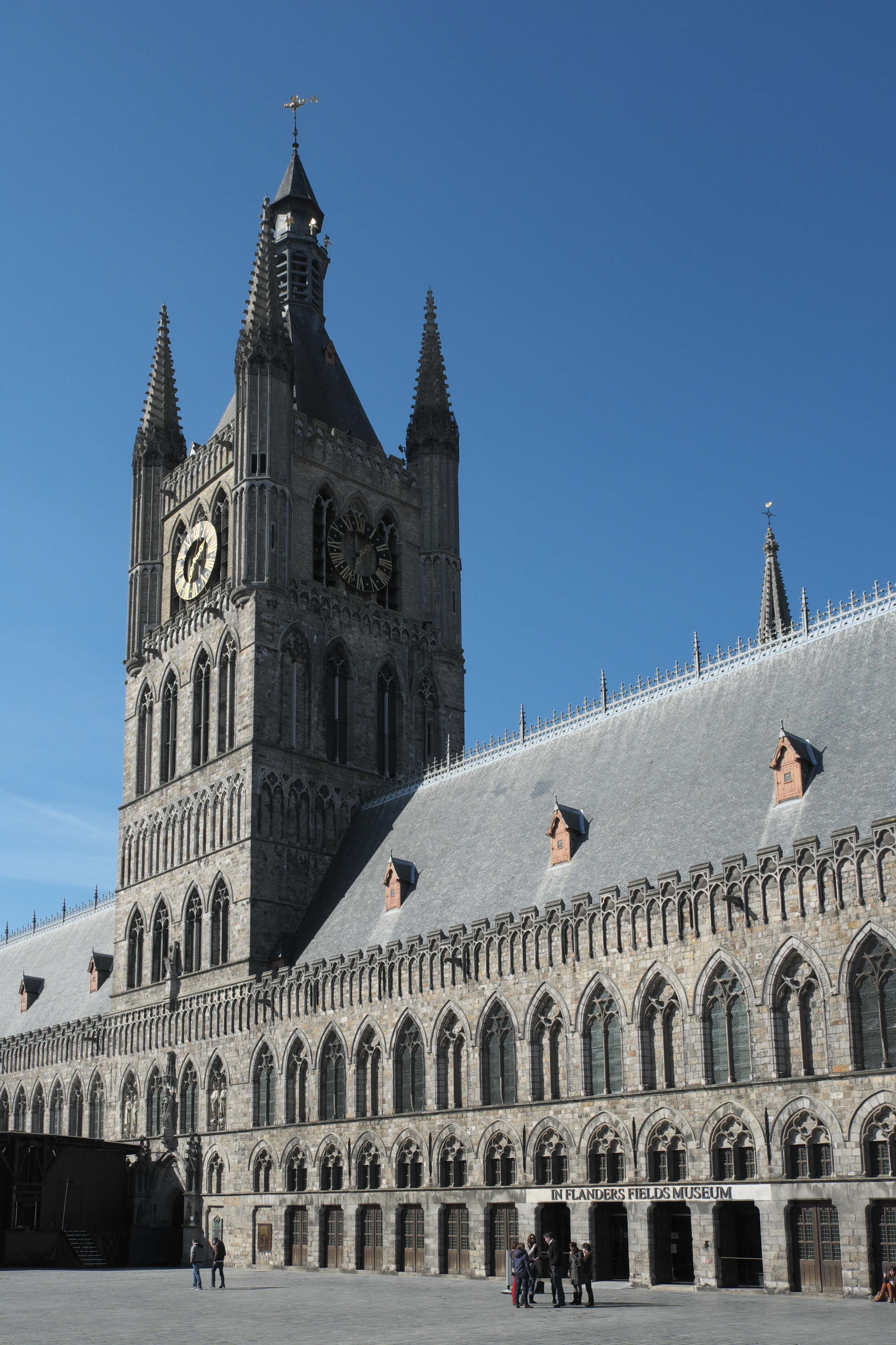 Tuchhalle (Lakenhalle) in Ypern in der Provinz Westflandern (Belgien)